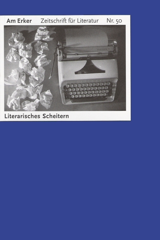 Das Cover zum Heft Nr. 50